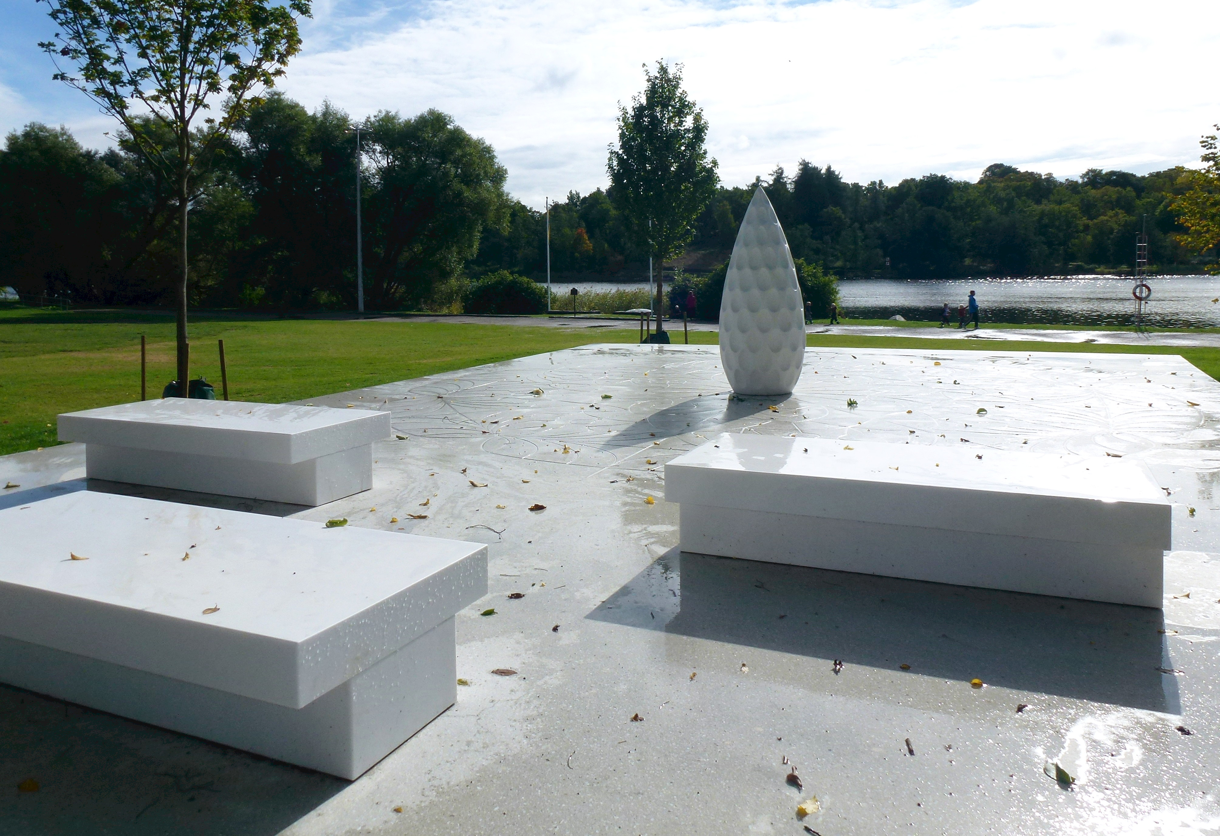 Monument "Restare" på Djurgården, skapad av Monika Larsen Dennis